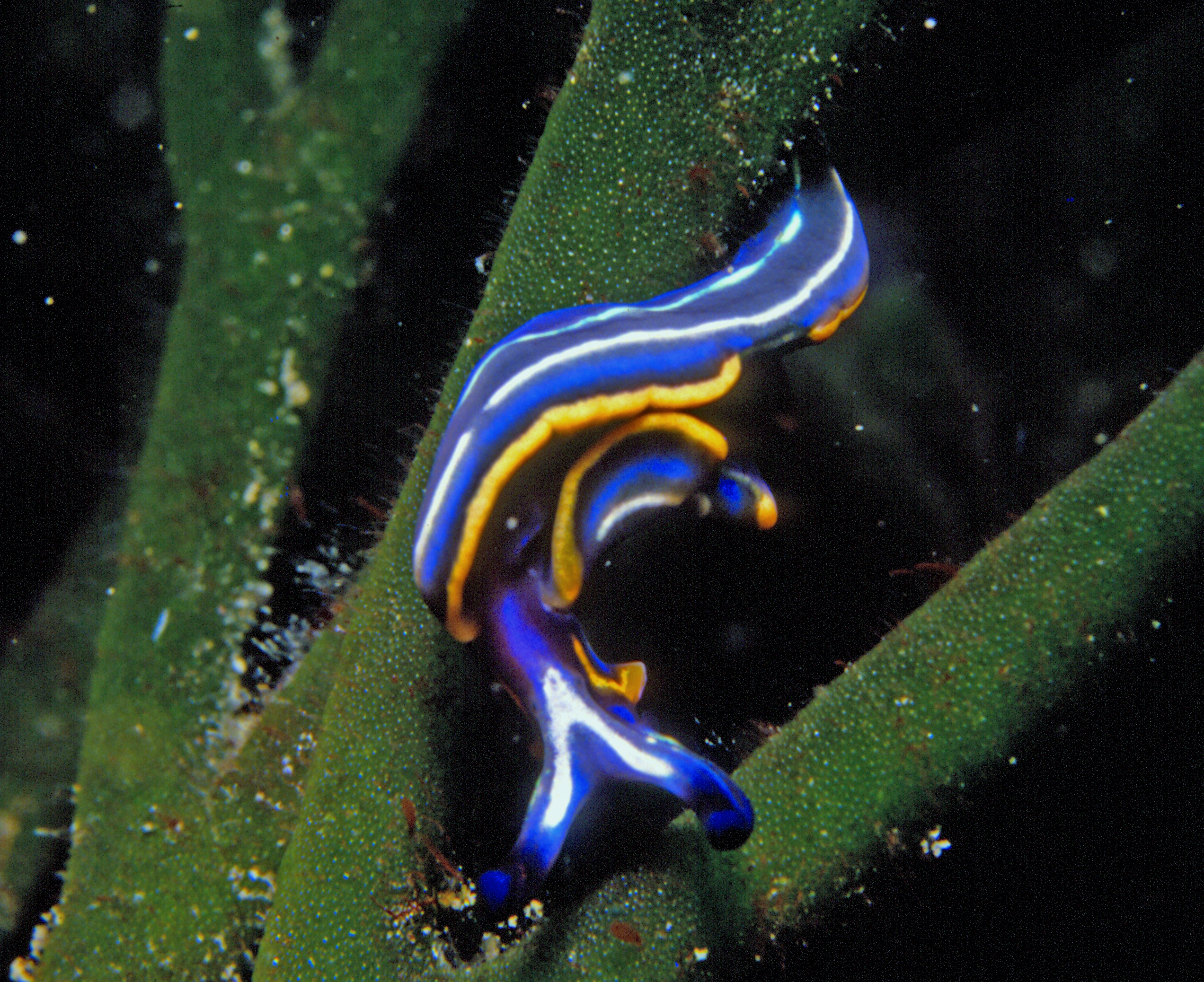 Thuridilla hopei - Banyuls-sur-Mer : 08/84